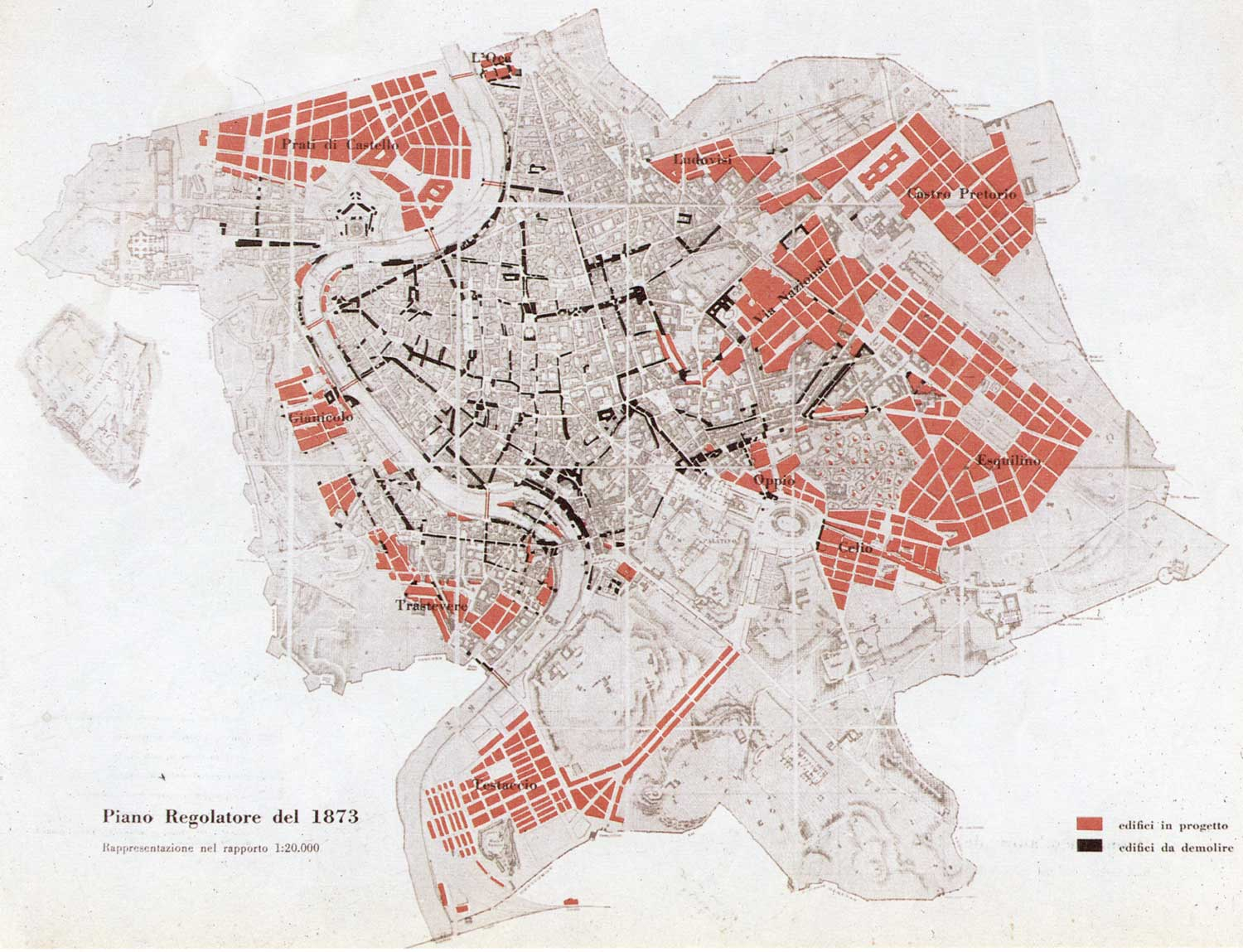 Il Piano Viviani di Roma del 1873